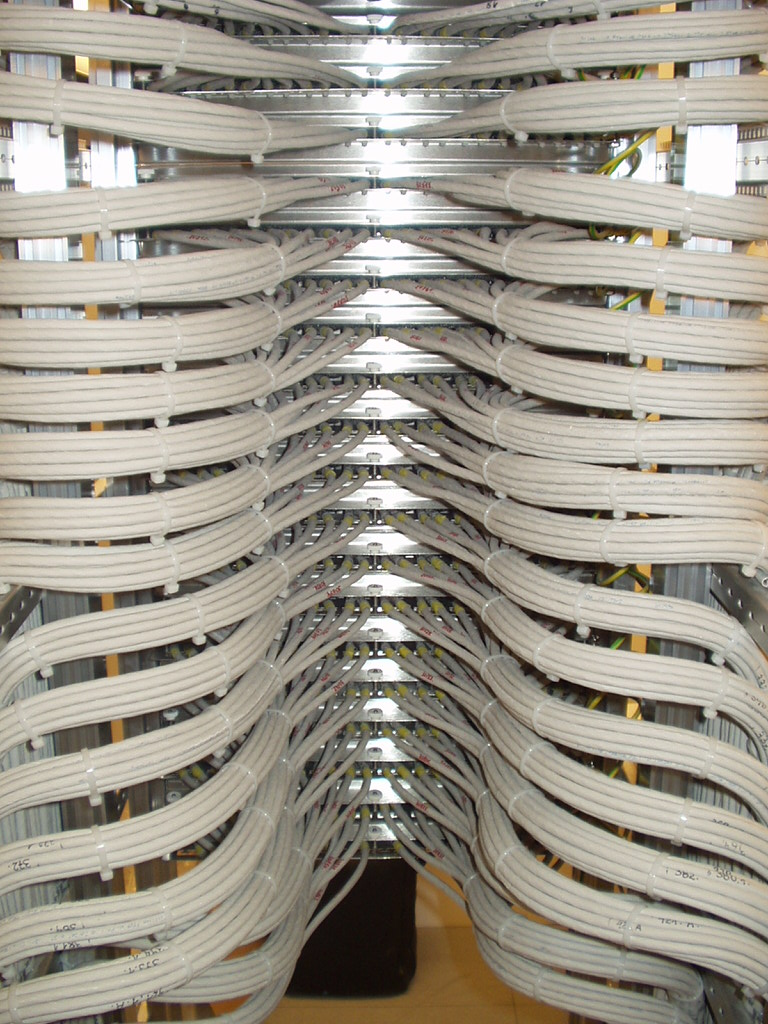 Patchfeld Cat.8 - Netzwerkkabel Ein Patchfeld von hinten Fotografiert am 25.11.2003 um 10.40 Paul Robert Piskorski Copyright Status: GNU Freie Dokumentationslizenz